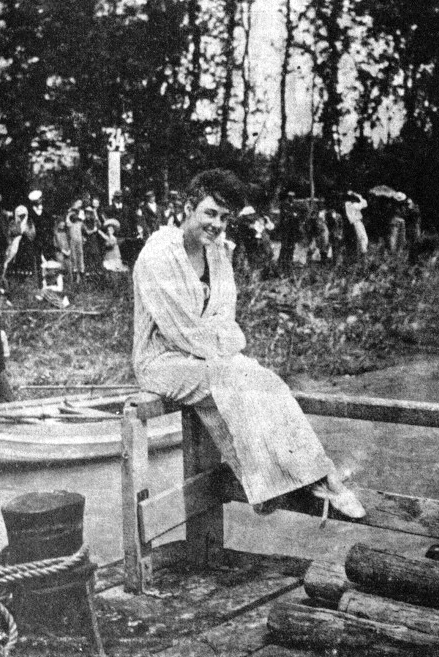 Annette Kellerman, australische Schwimmerin, vor ihrer Schwimmtour durch die Donau im Juni 1906